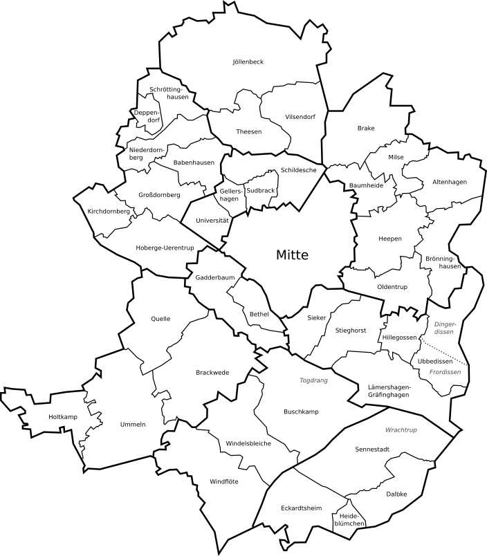 Alle Bielefelder Stadtteile